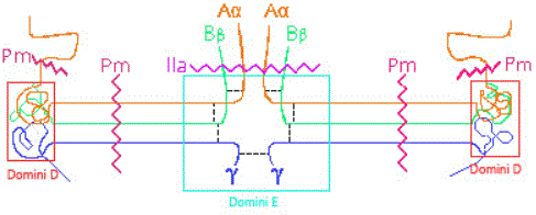 estructura